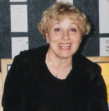 עדינה מור-חיים